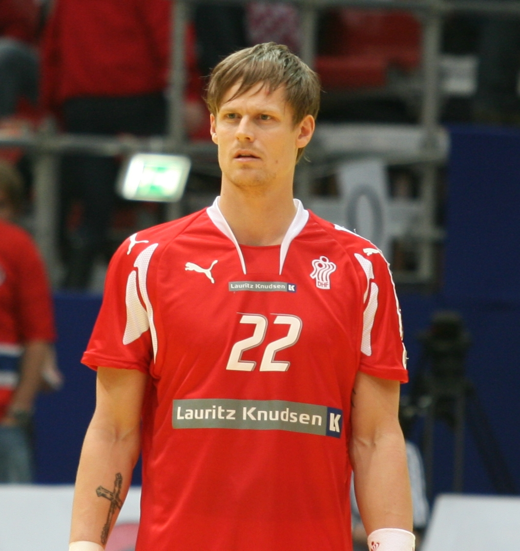 Kasper Søndergaard danish handballer